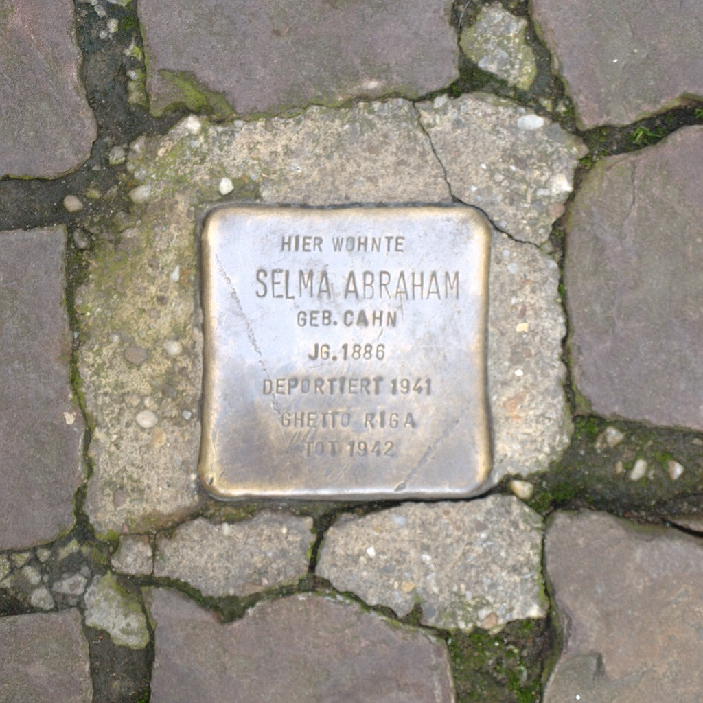 Stolperstein in Hattingen Selma Abraham